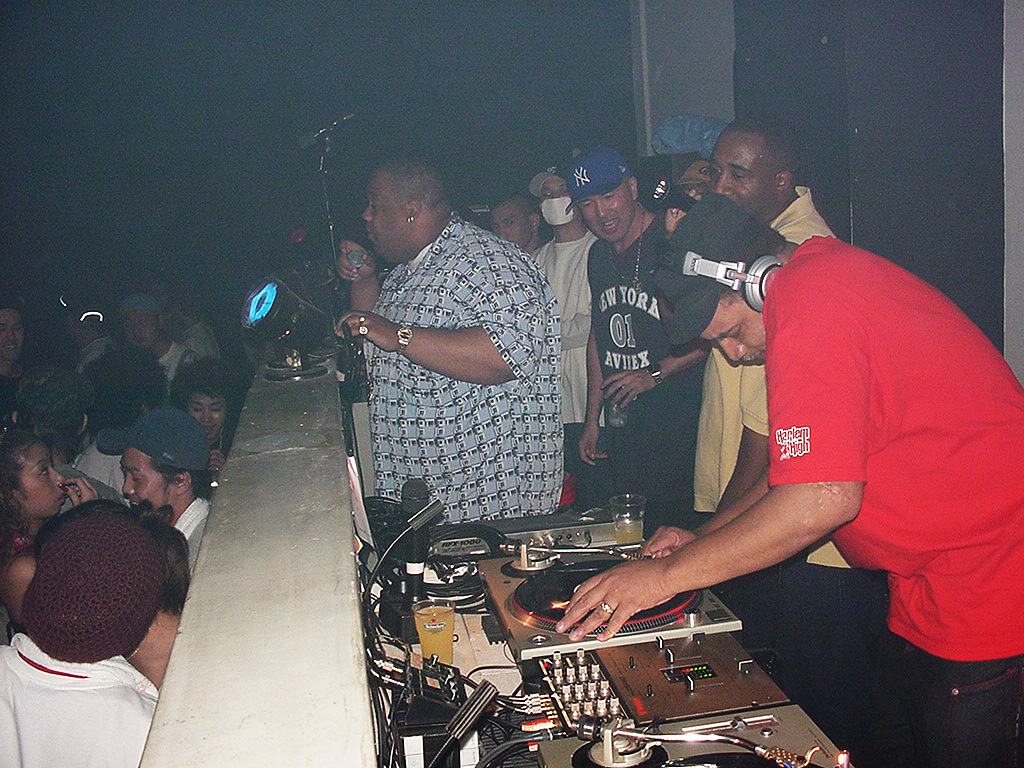 2001.5.18(fri) "DADDY'S HOUSE SPECIAL -KOOL DJ RED ALERT JAPAN TOUR 2001-"